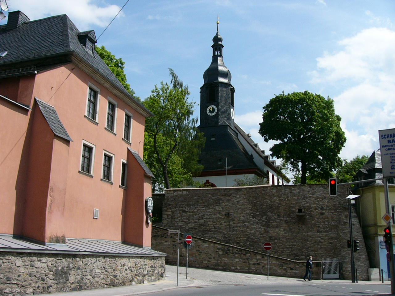 Ansicht von St. Lorenz